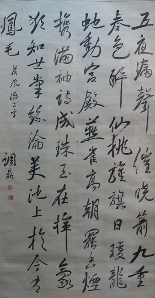 [清] 梅调鼎 书法 行书七言律诗 墨 纸本 来自：清代梅调鼎书法 行书七言律诗 原作为二维平面艺术（古代书法作品），作者逝世已逾百年，无特殊版权要求。